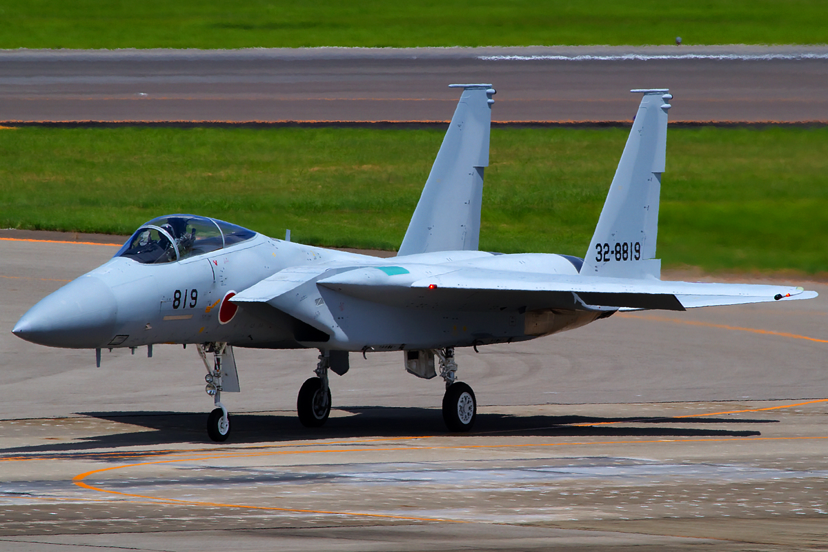 小牧をタキシングするF-15J #819